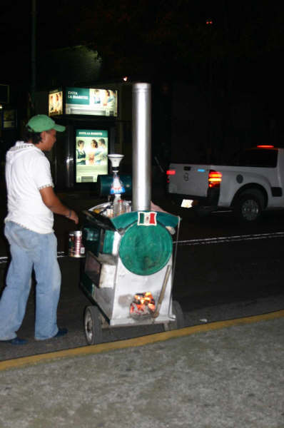 Carrito de los camotes, México D.F. 2008.